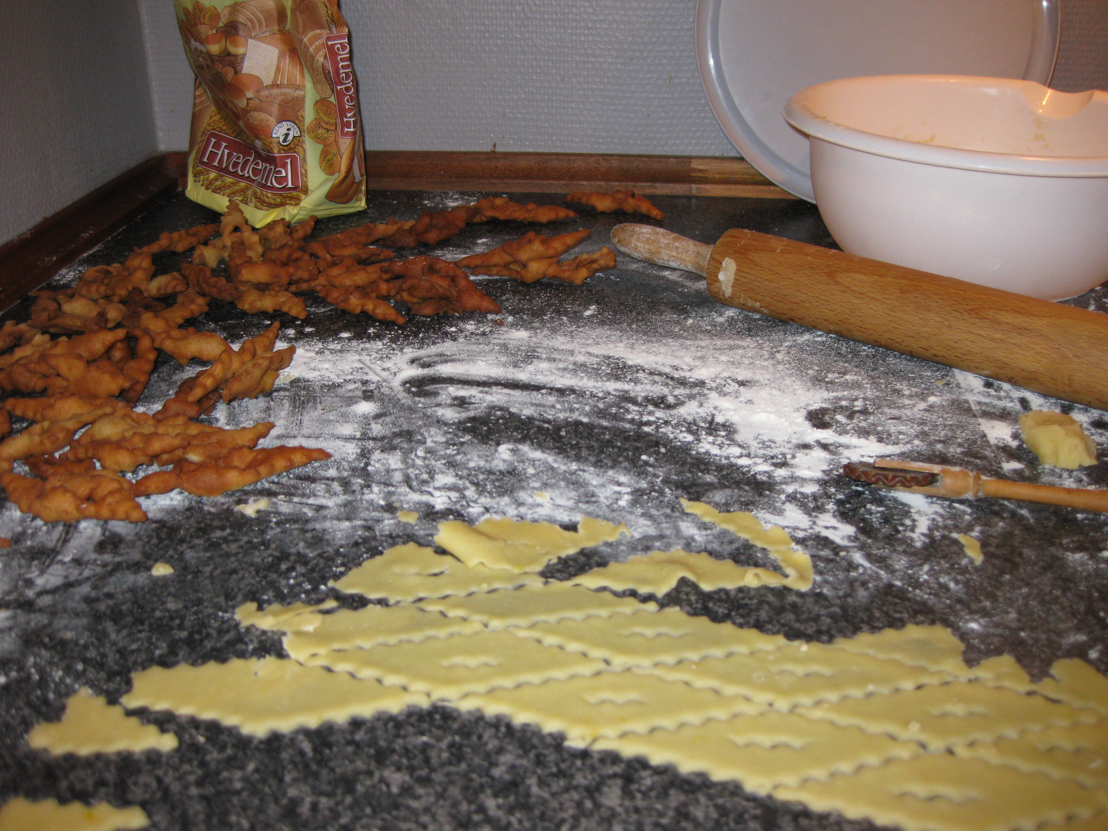 Klejner